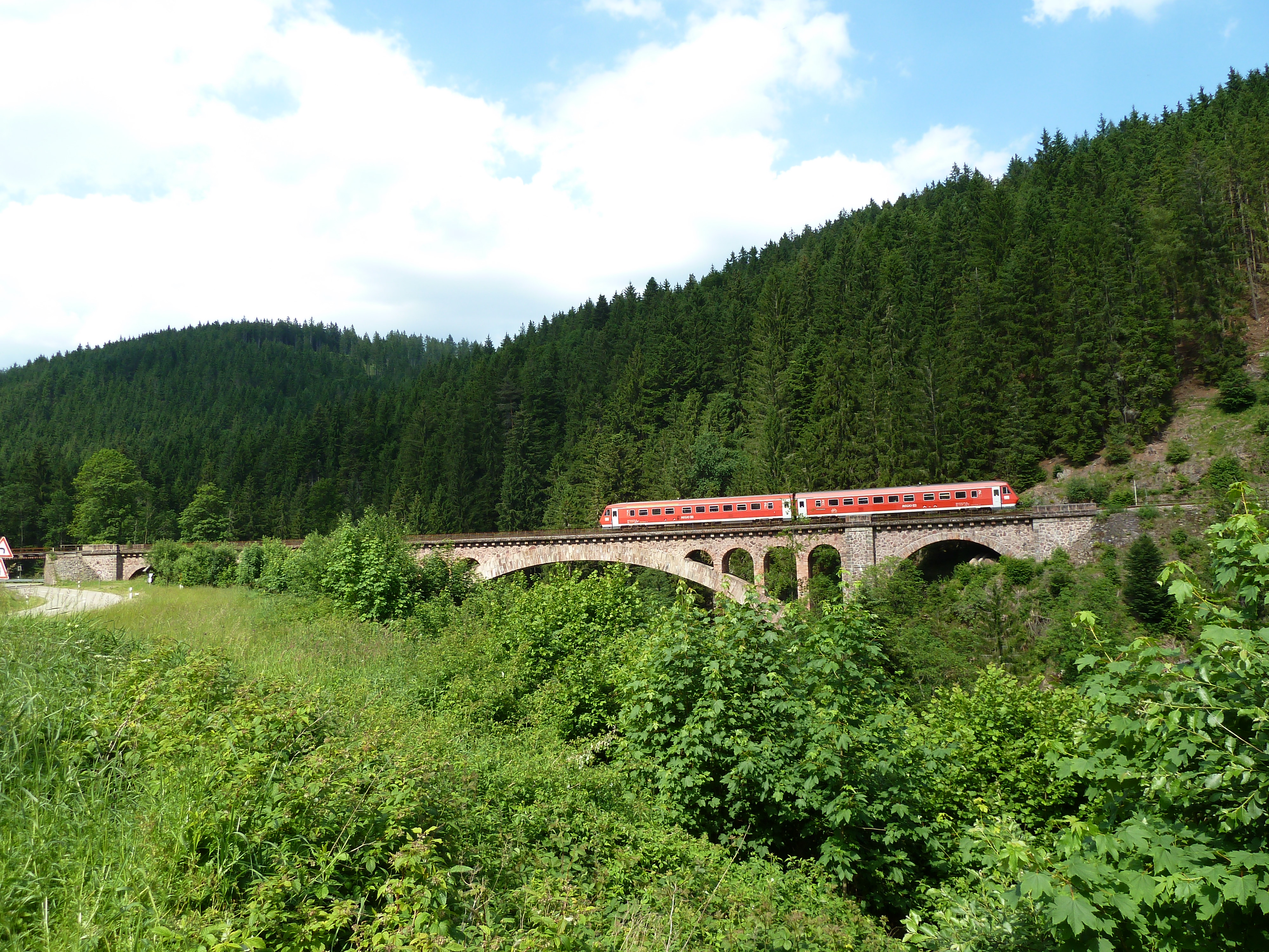 Viadukt der Höllentalbahn über das Gutachtal